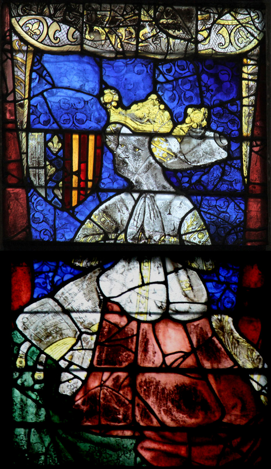 Yolande d'Aragon représentée dans un vitrail du bras nord du transept de la cathédrale Saint-Julien du Mans.